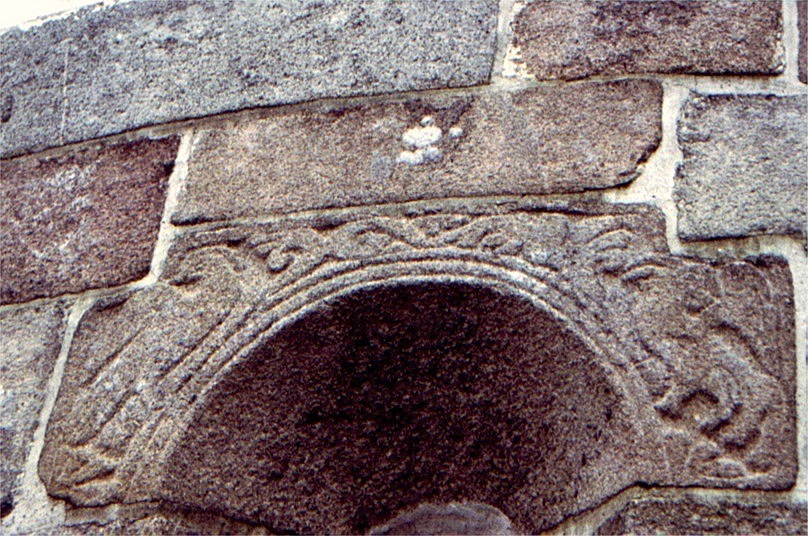 Jetsmark Kirke, østvindue i apsis